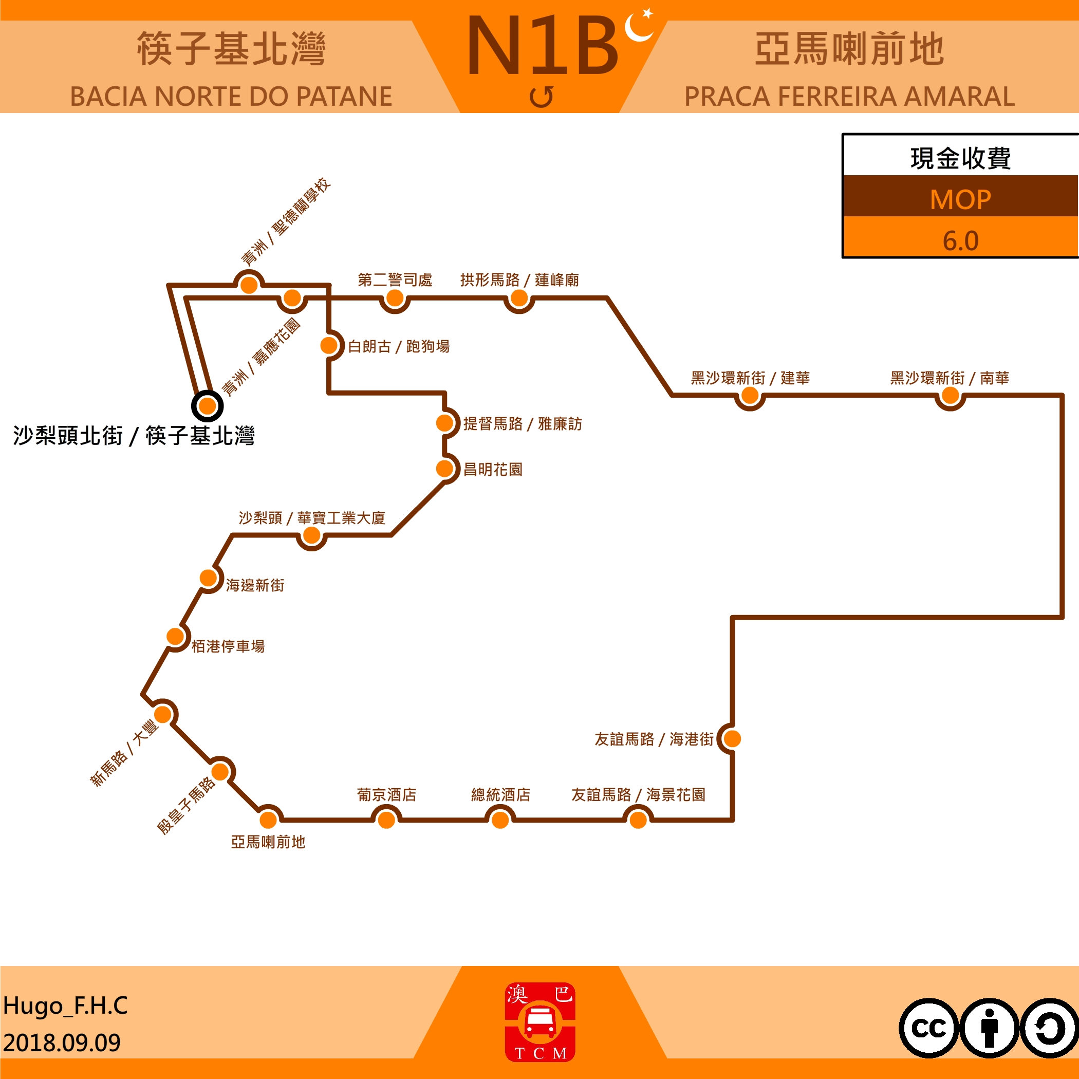 澳門巴士N1B走線圖